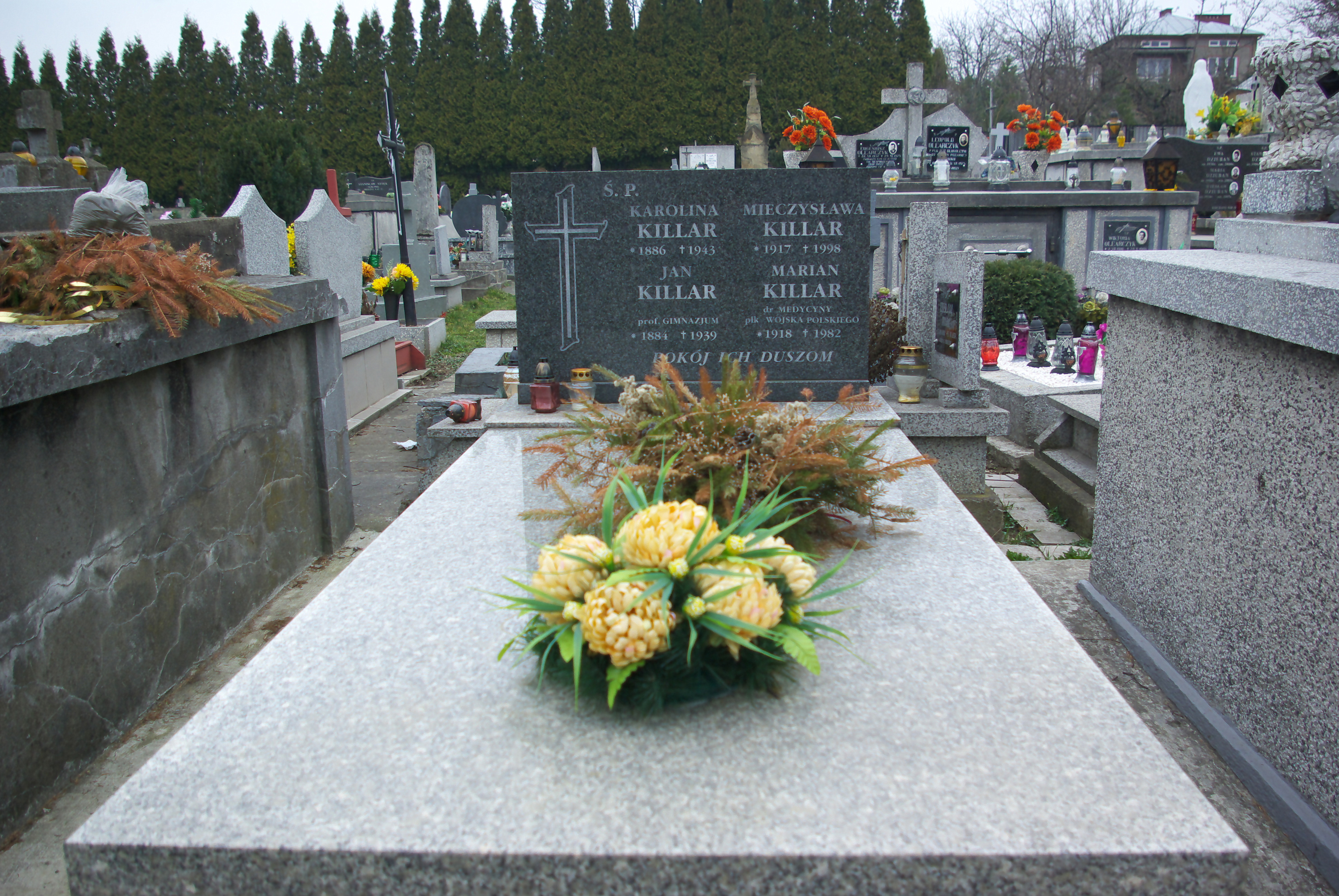 Grobowiec rodziny Killar na Cmentarzu Centralnym w Sanoku.